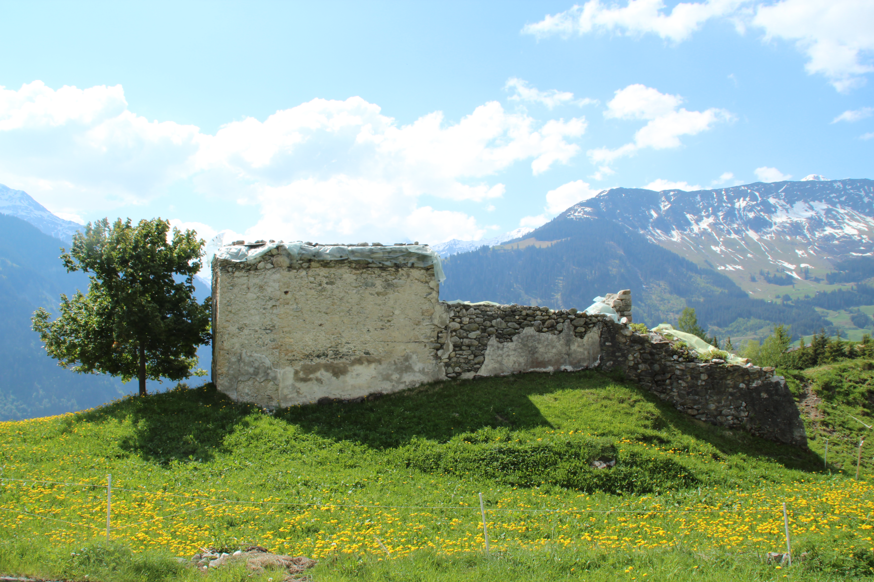 Ruine Caplutta Sogn Benedetg Blick nach Süden